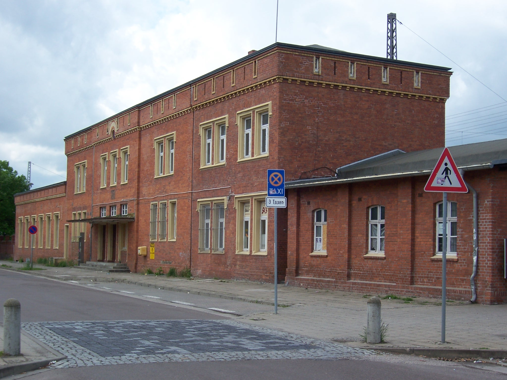 Bahnhof Roßlau (Elbe), Empfangsgebäude Straßenseite